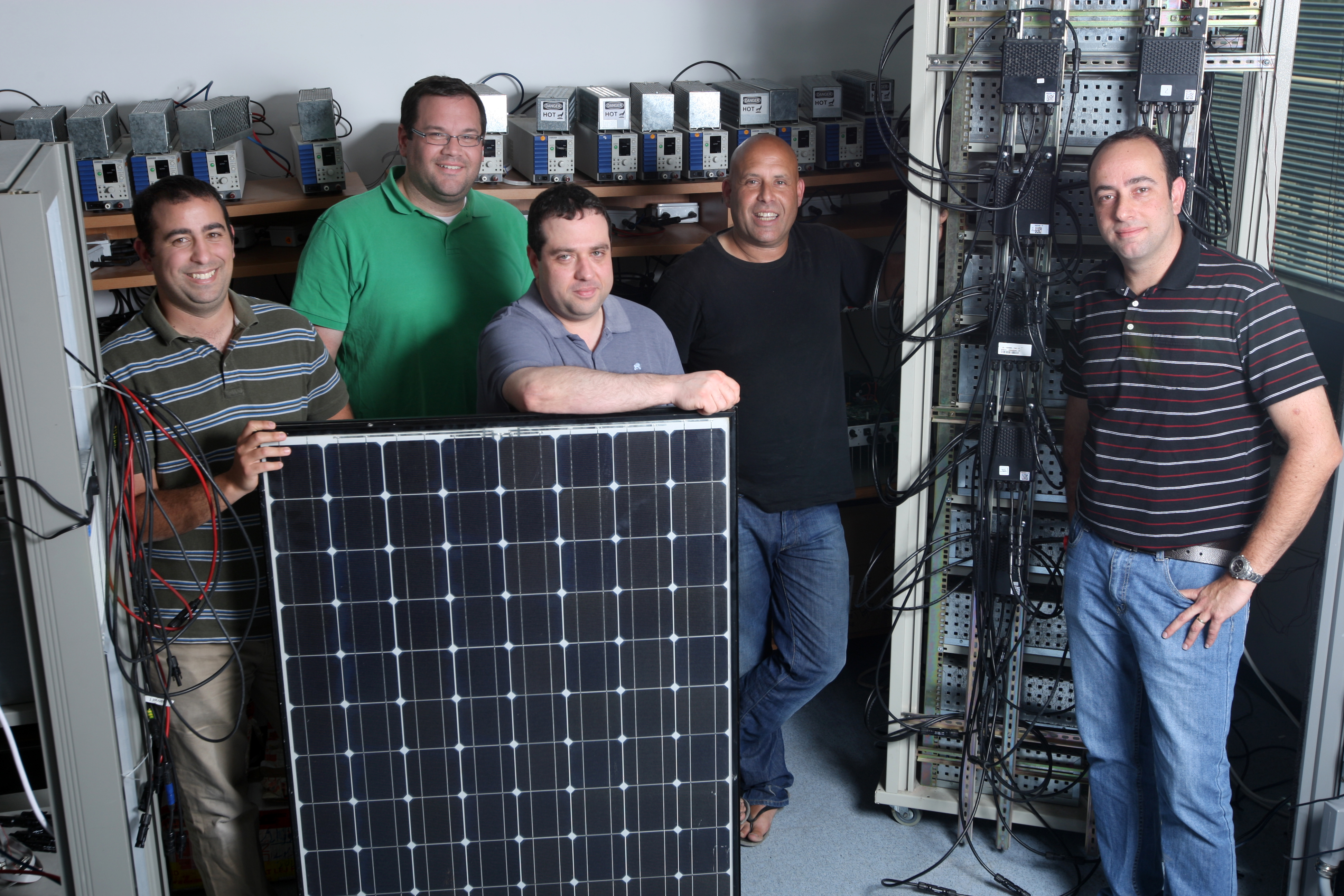 מייסדי סולארדג' בימיה הראשונים (צילום: עמית שעל)